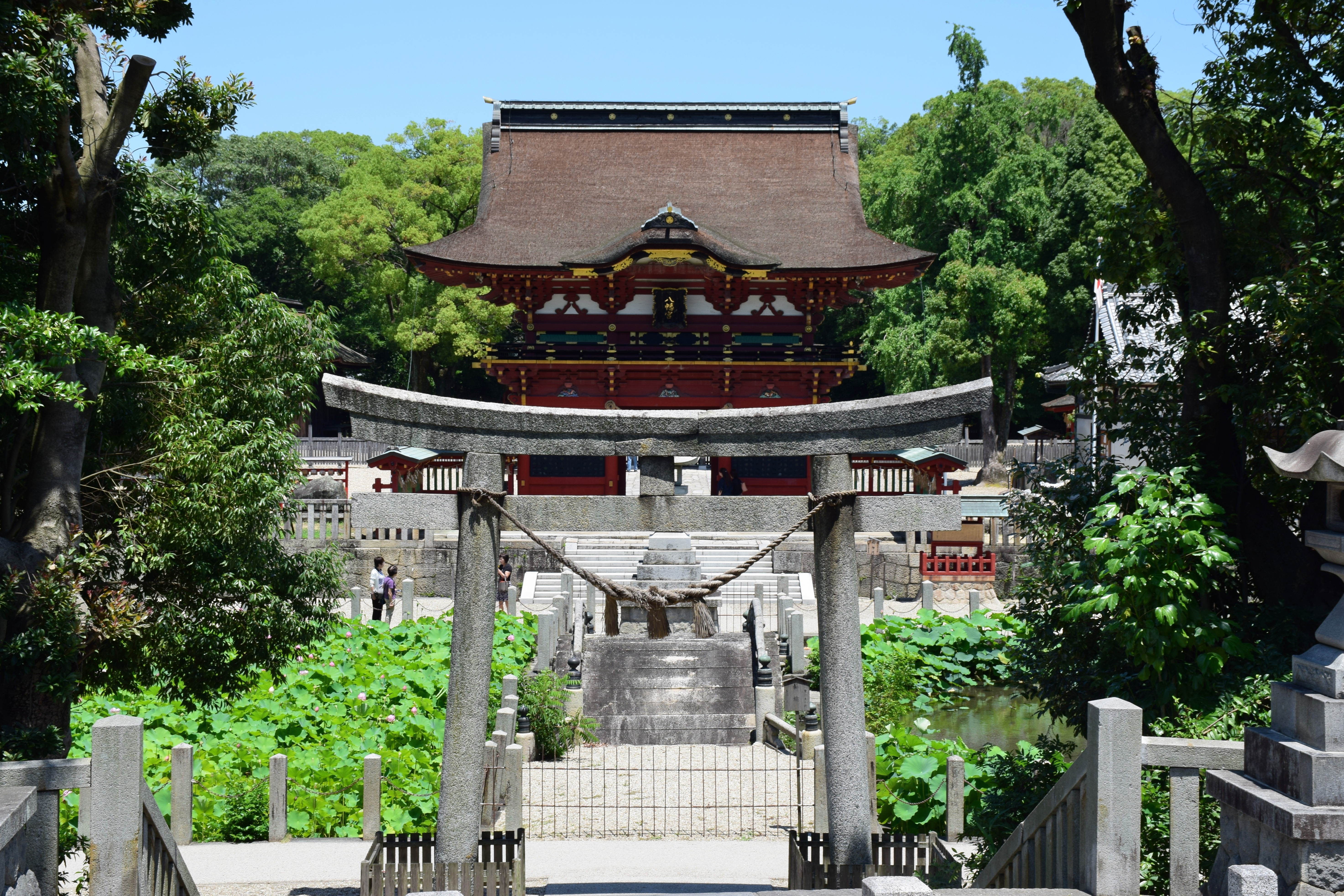 伊賀八幡宮 Nikon D5300